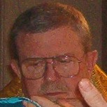 Архимандрит Роберт Тафт Рим